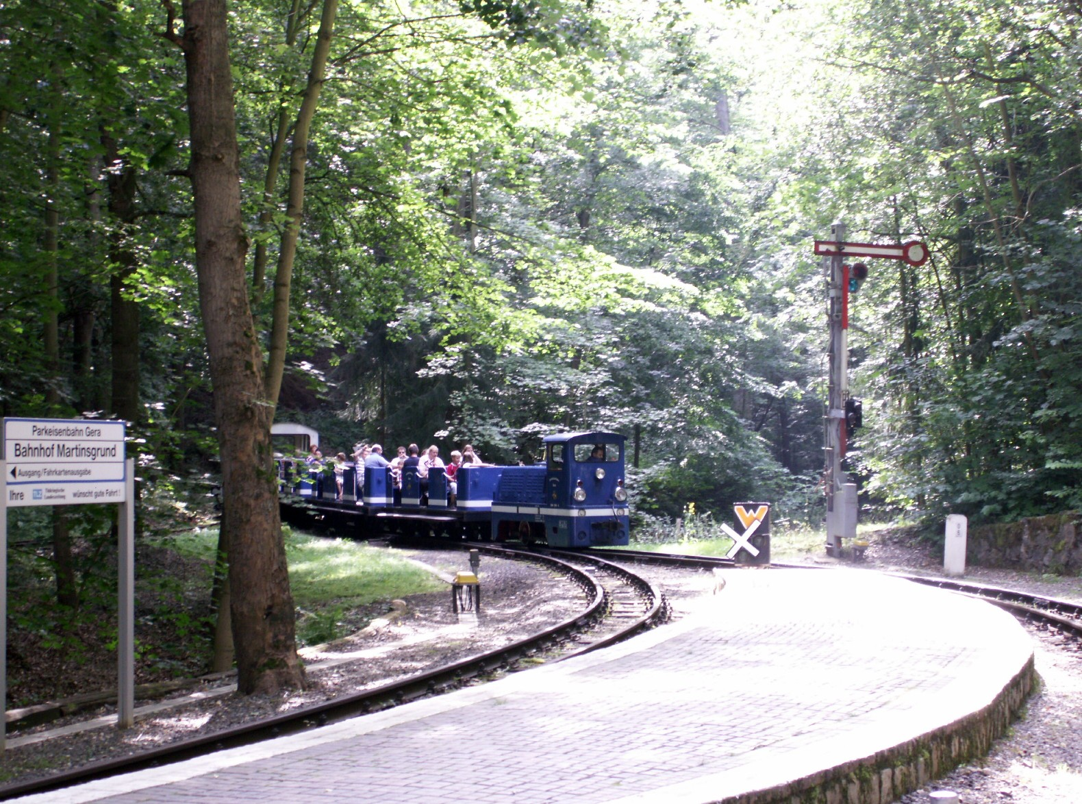 Parkbahn Gera